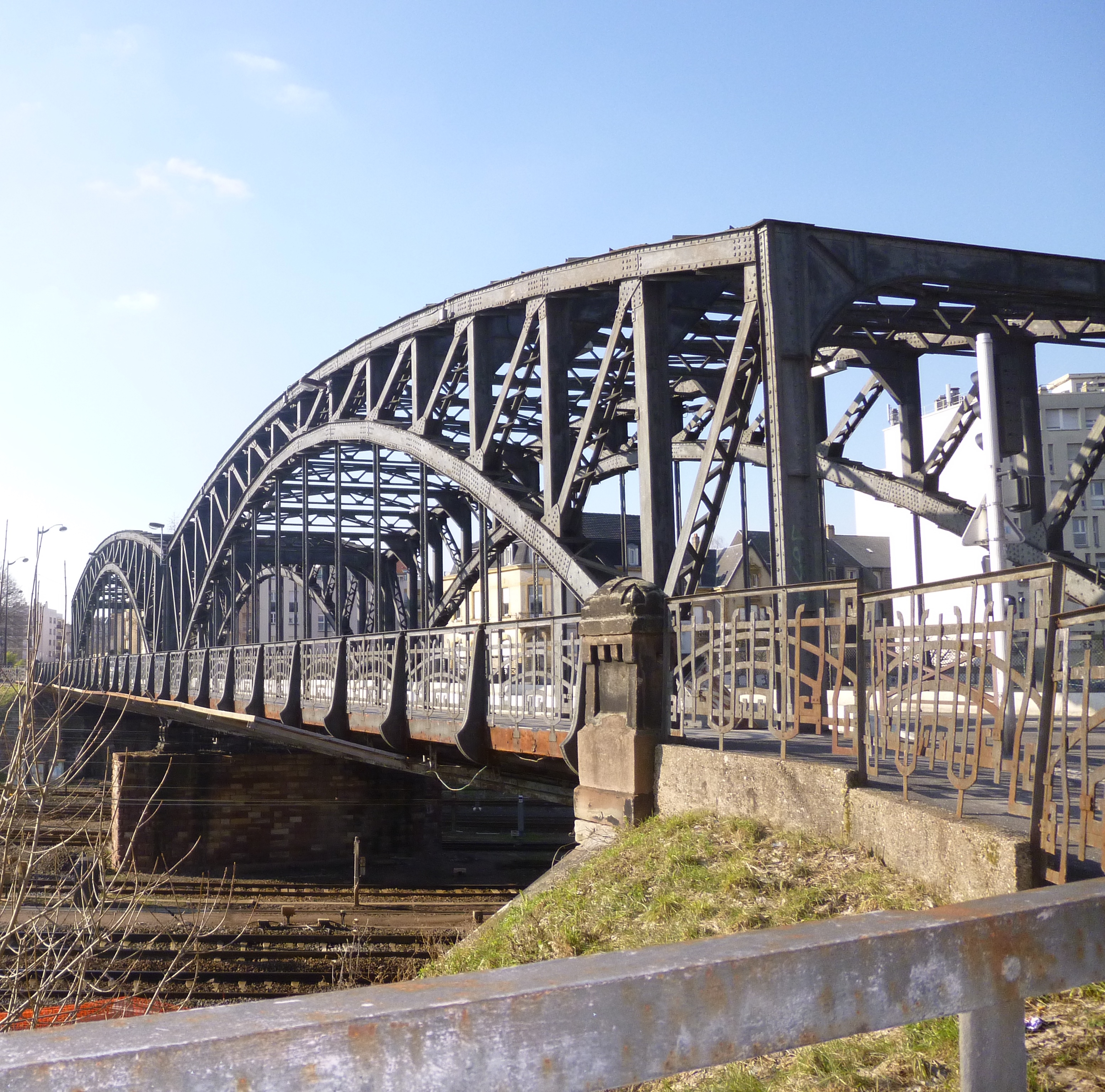 Pont Amos au Sablon, Metz (Moselle).